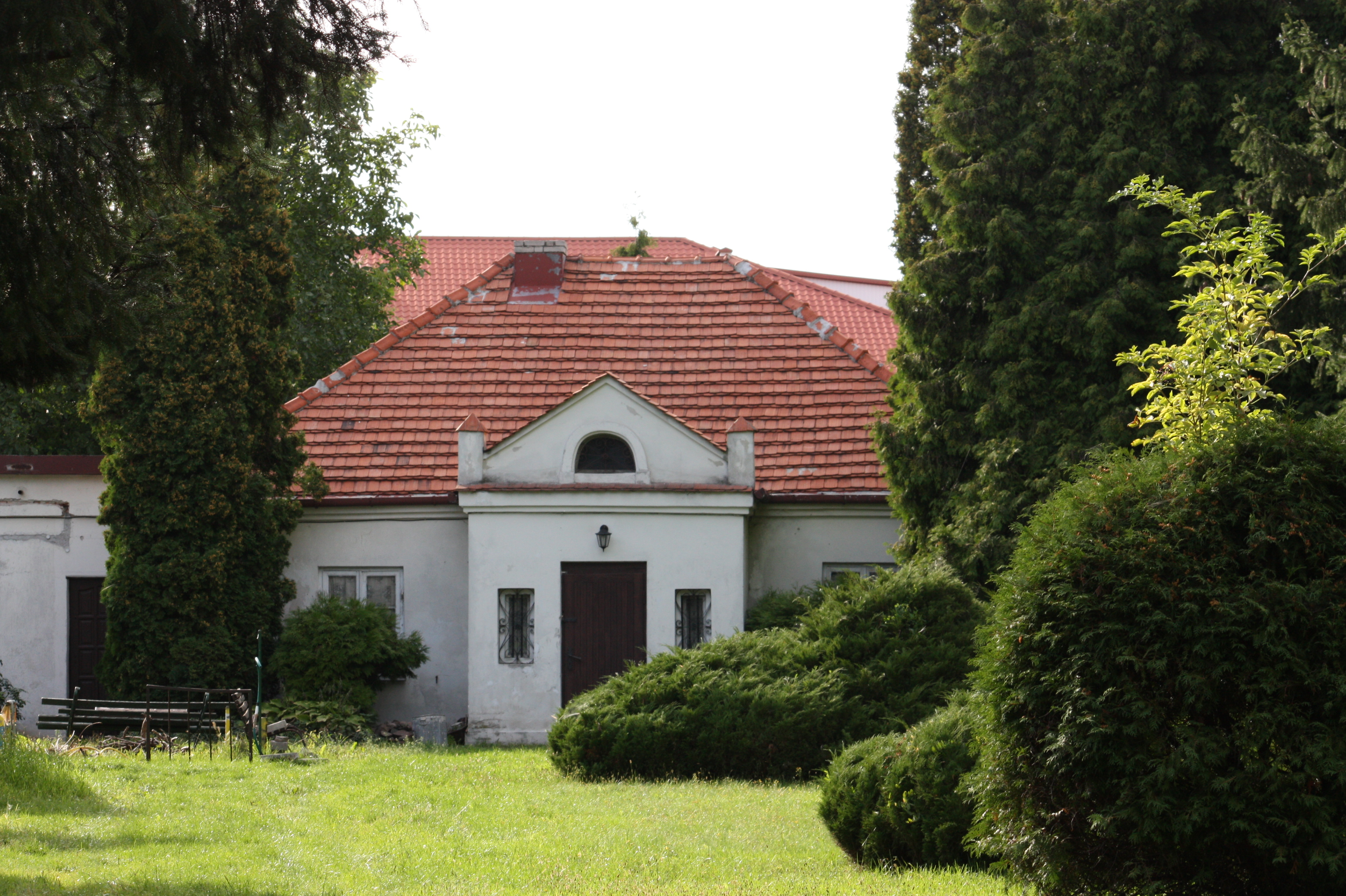 Oficyna obok dworku w Ożarowie Mazowieckim